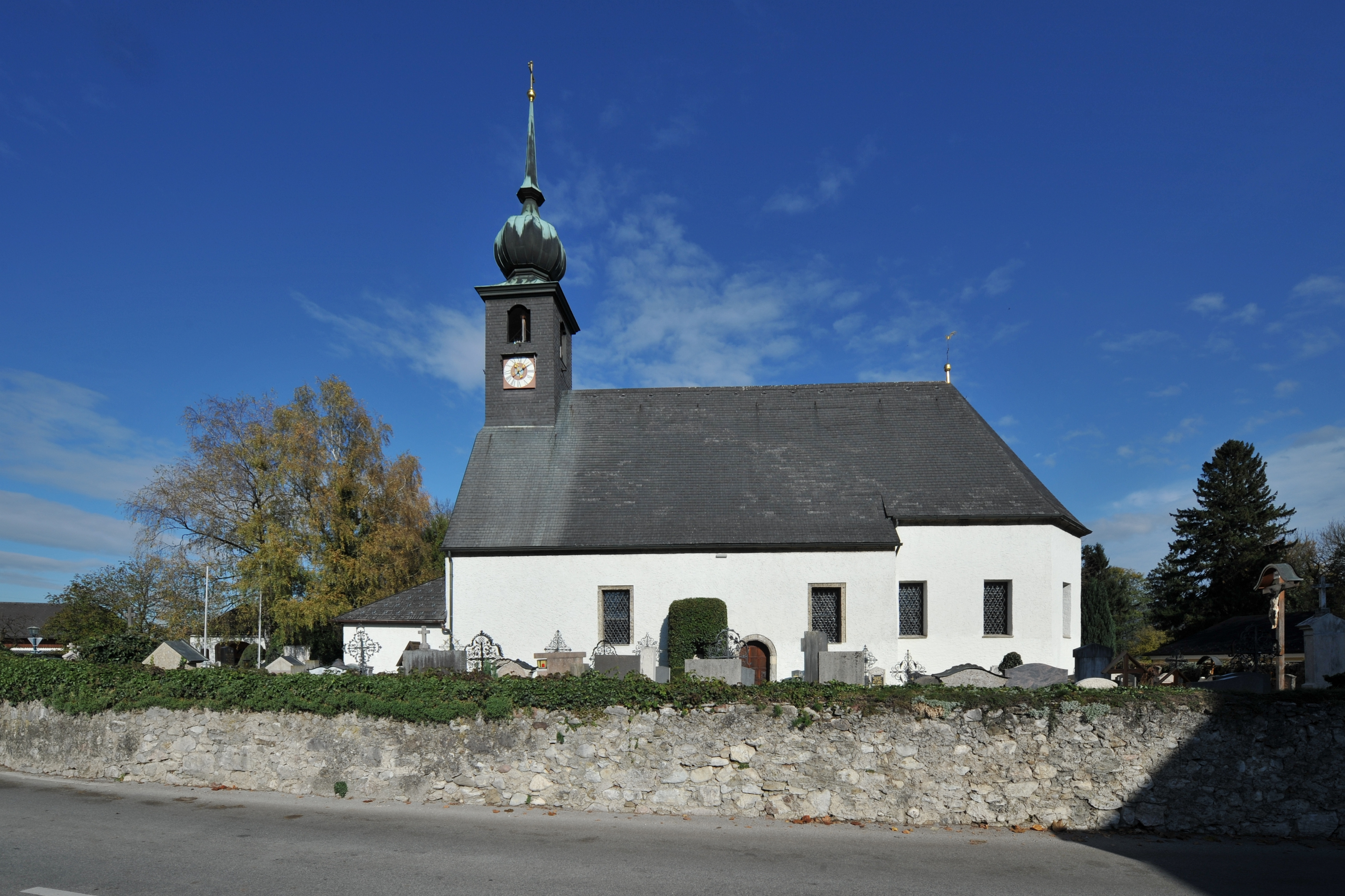 Kath. Pfarrkirche hl. Johannes der Täufer The making of this work was supported by Wikimedia Austria. For other files made with the support of Wikimedia Austria, please see the category Supported by Wikimedia Österreich. Object location47° 43′ 52.9″ N, 13° 03′ 37.62″ E